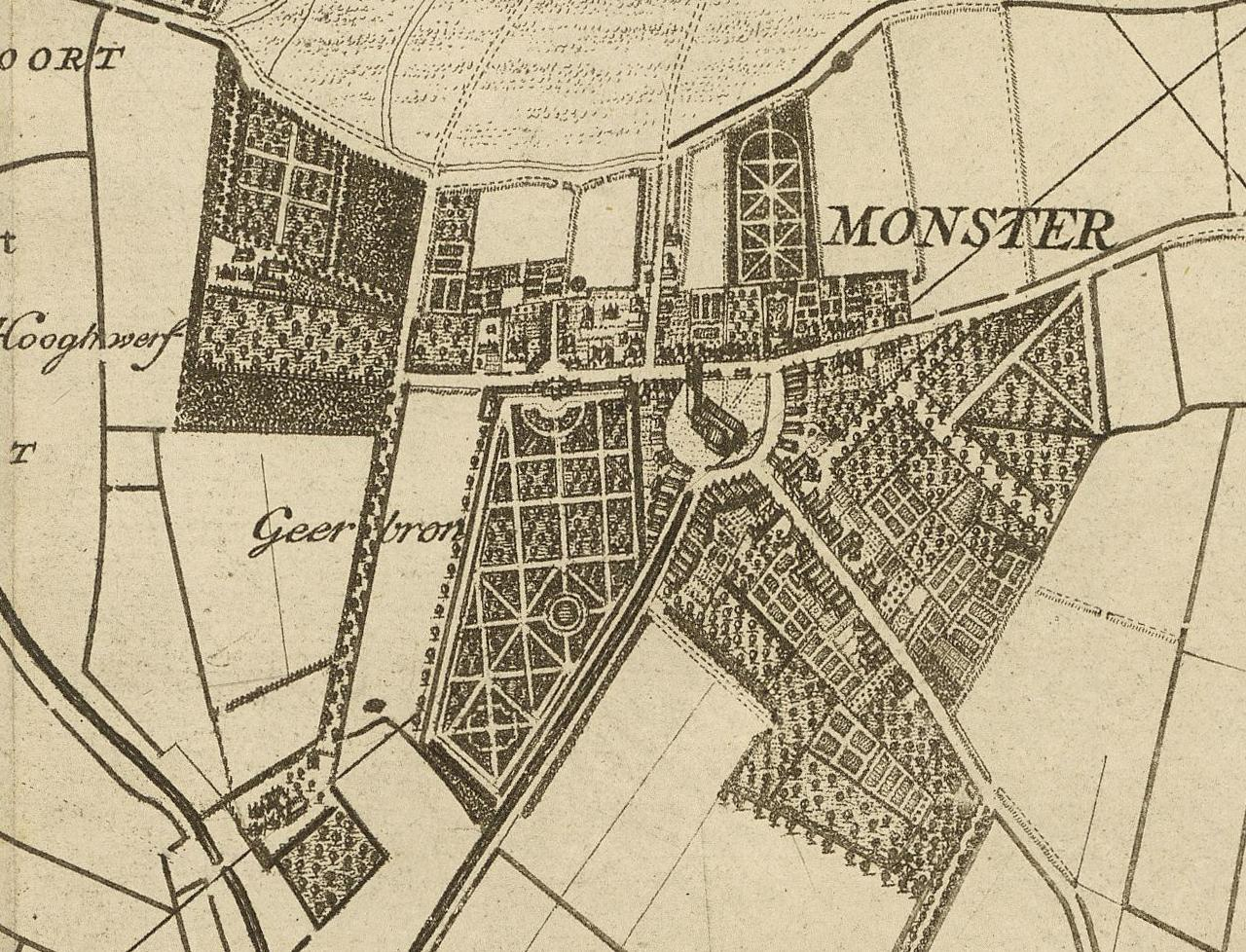 Kaart van het hoogheemraadschap van Delfland, gemeten door de landmeters Nicolaas en Joacobus Kruchius. Afgebeeld is Monster, Zuid-Holland.